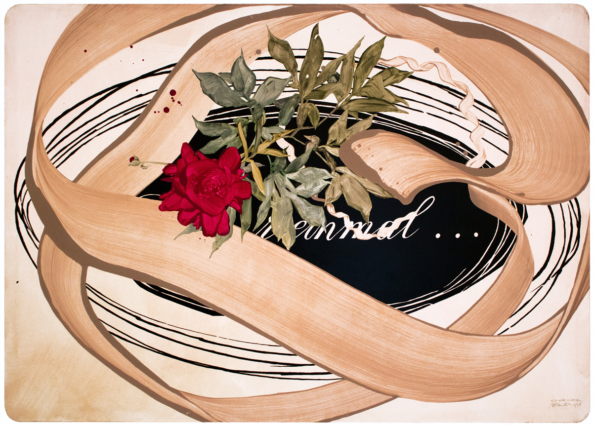 Pigment und Bindemittel auf Leinwand, 100 x 140 cm signiert, datiert, betitelt und numeriert Beni Altmüller